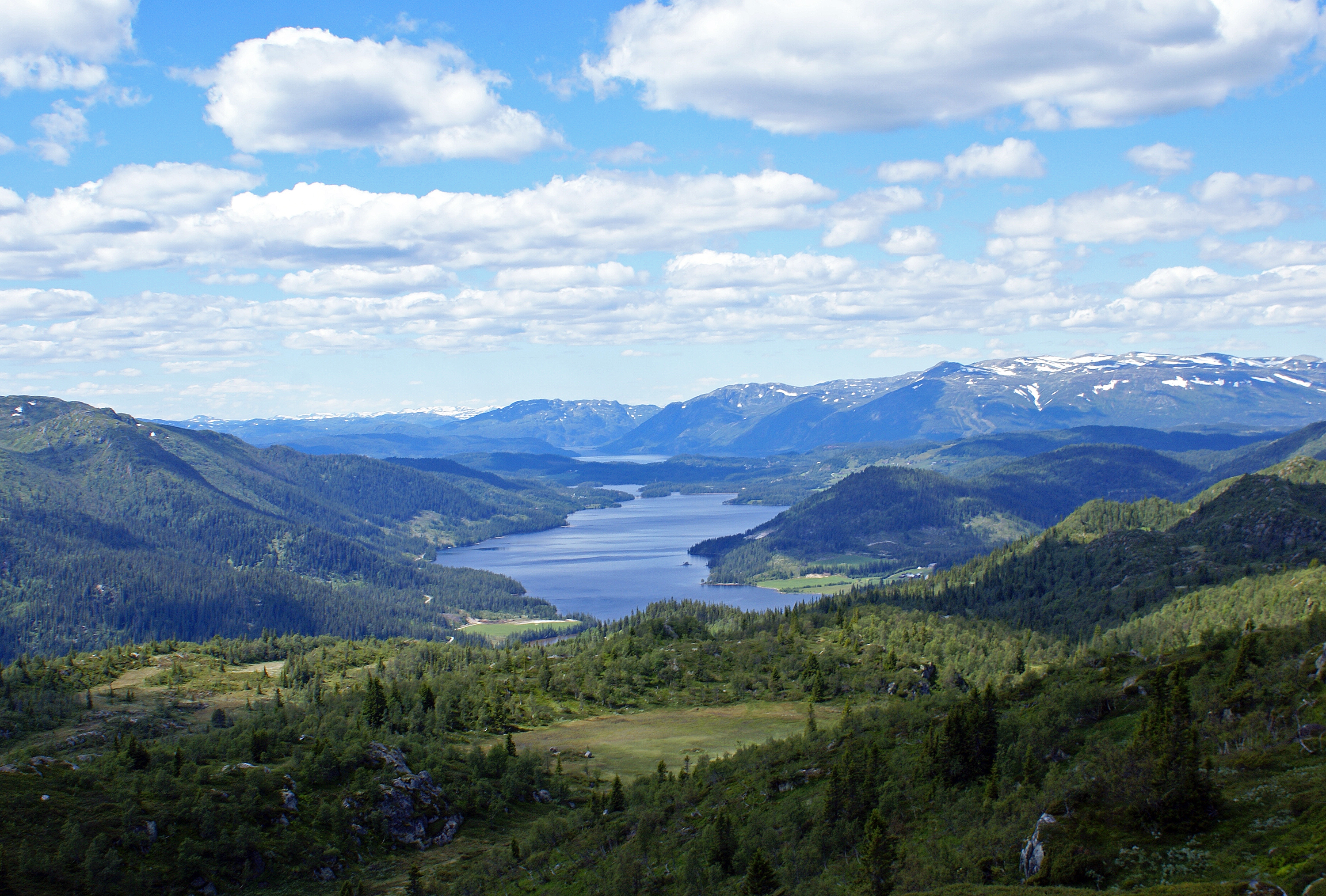 Summer landscape Telemark